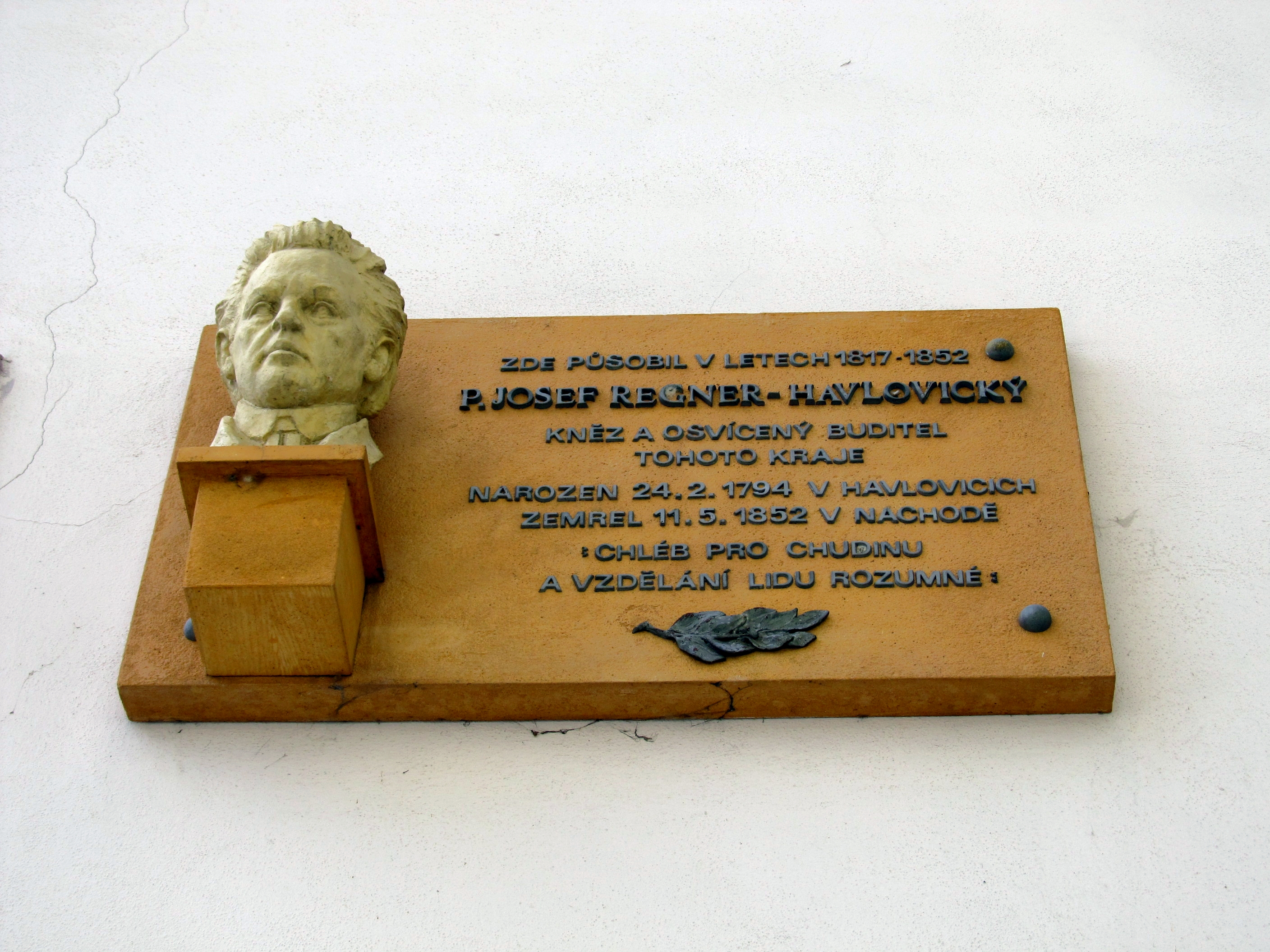 Děkanství (Náchod), Masarykovo náměstí 75, Náchod